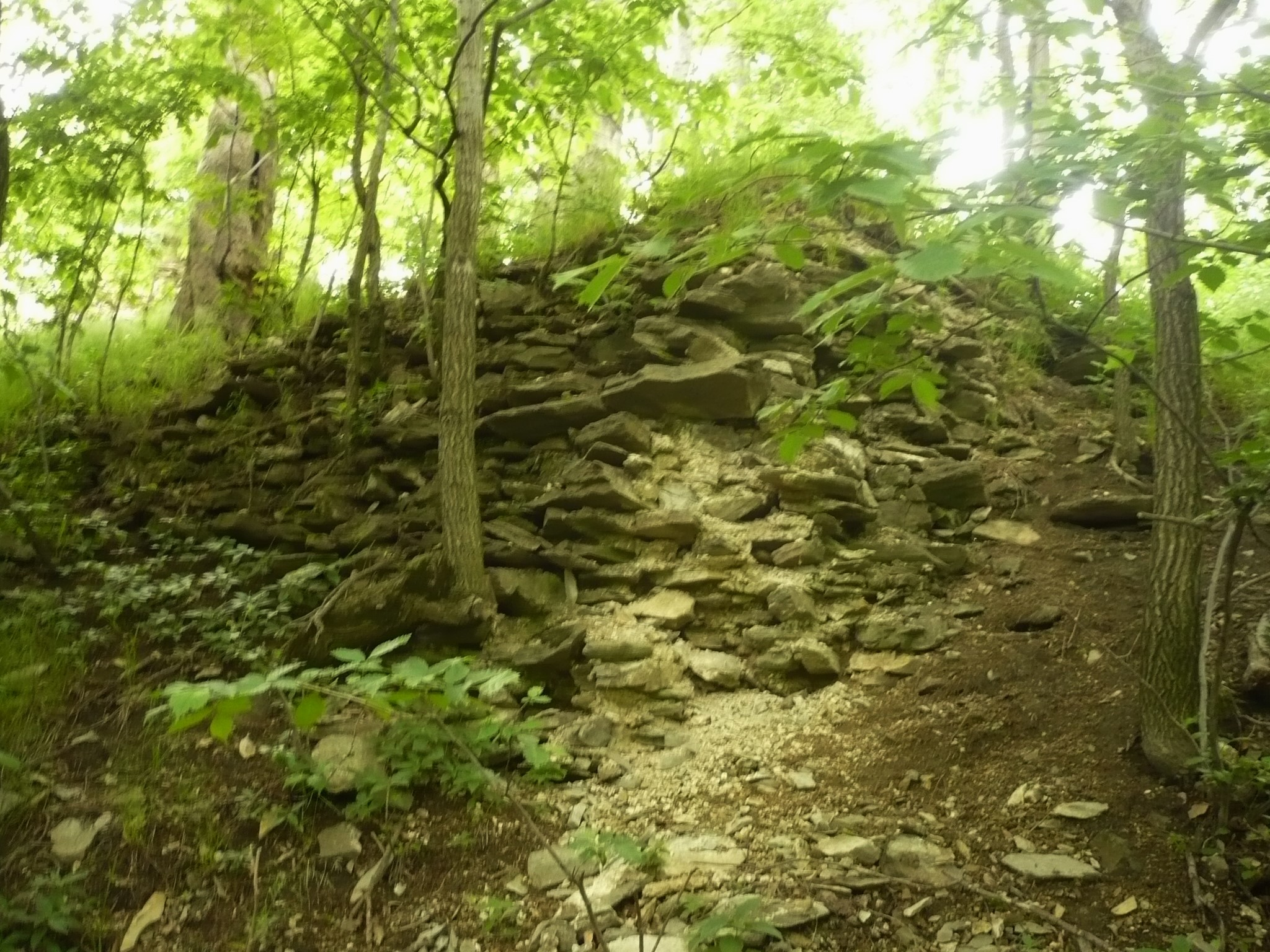 Zamek Homole